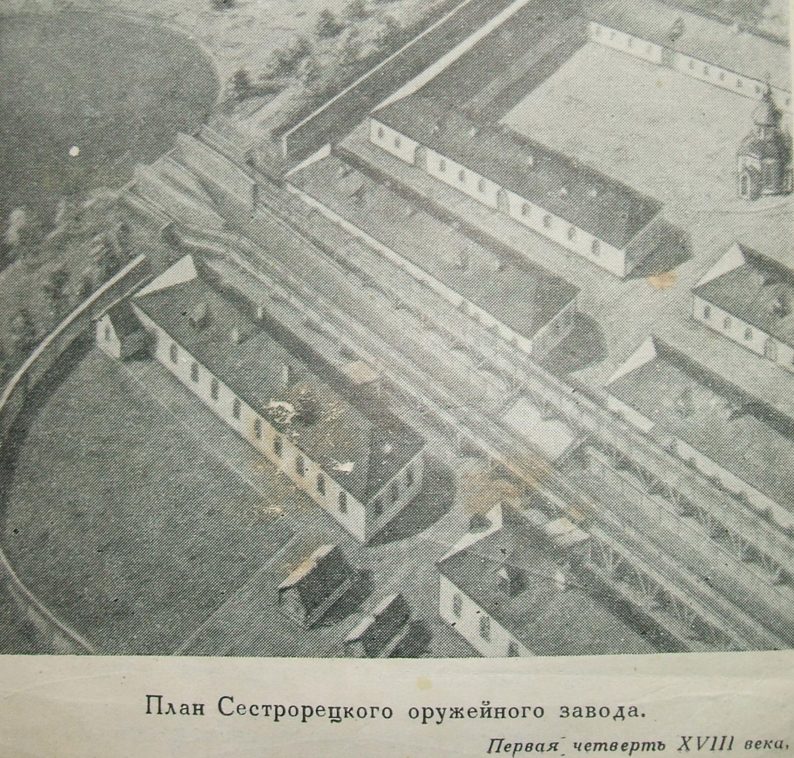 Сестроецкий оружейный завод в первой четверти 18 века